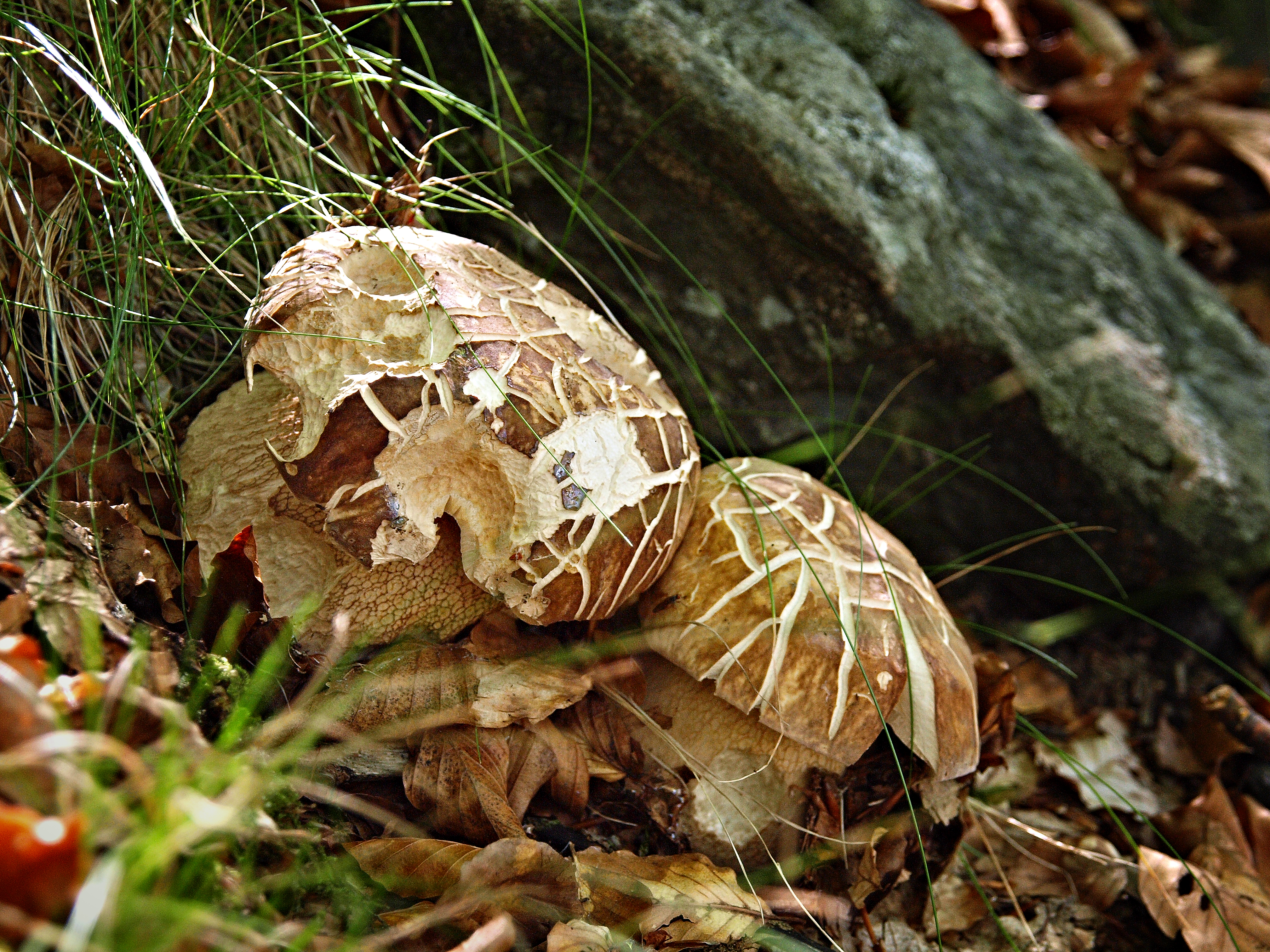 Boletus aestivalis (Cèpes réticulés) in Vizzavona forest - Corsica